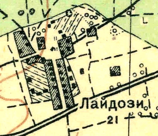 Топографическая карта Ленинградской области, квадрат О-35-24-Б-а (Переярово), деревня Лайдузи